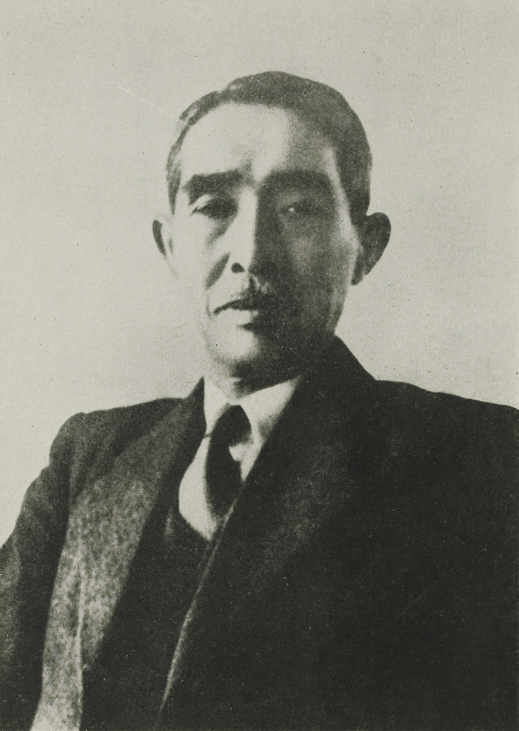 Portrait of Tanaka Hozumi (田中穂積, 1876 – 1944)